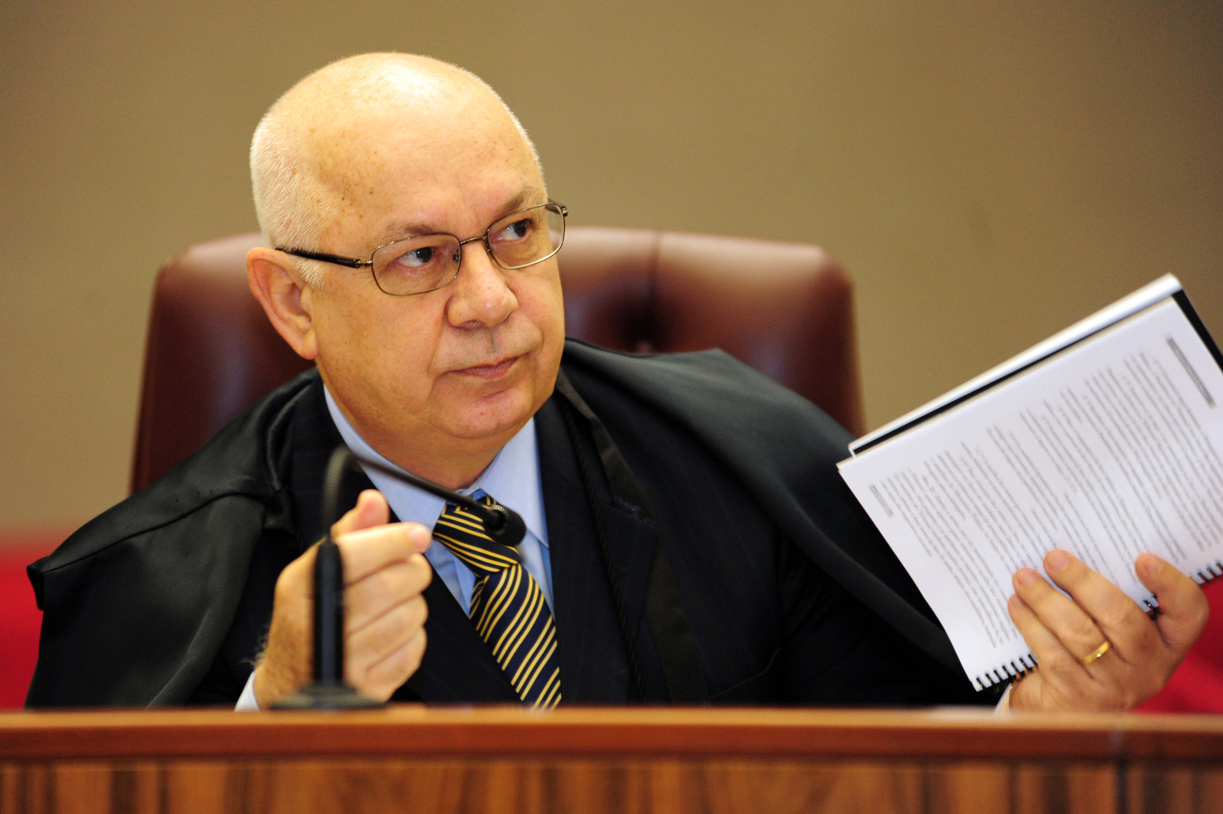 Teori Zavascki, ministro do Superior Tribunal de Justiça, em maio de 2012.